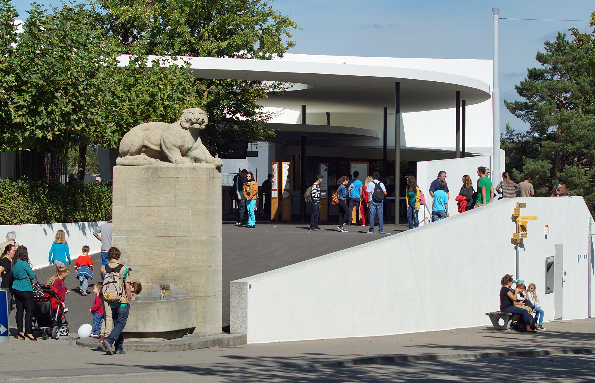 Zoo Zürich – neu gestalteter Eingang mit Sumatra-Tiger Skulptur von Rudolf Wening (1893–1970) beim Brunnen